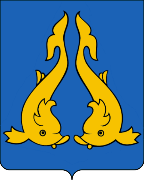 Coat of arms of Dobruja